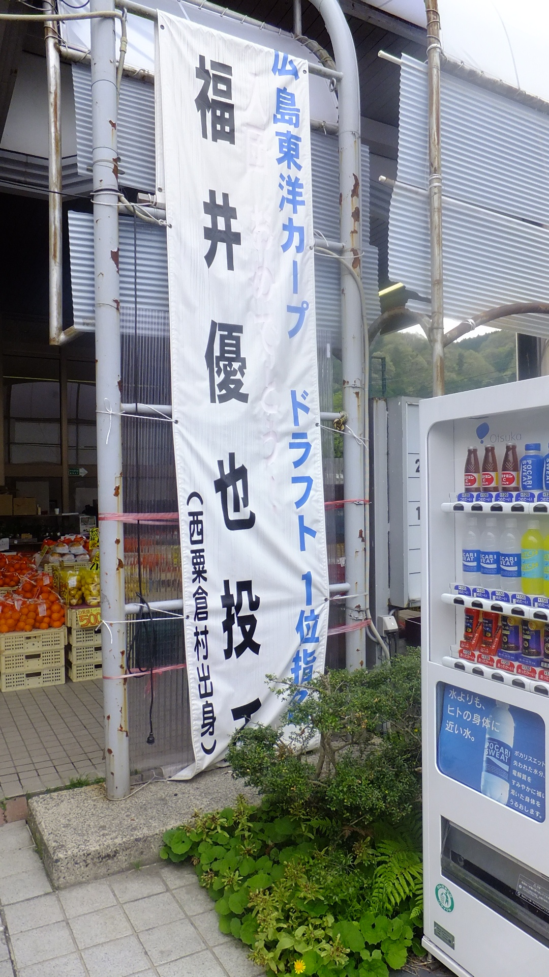 福井優也ドラフト記念垂れ幕